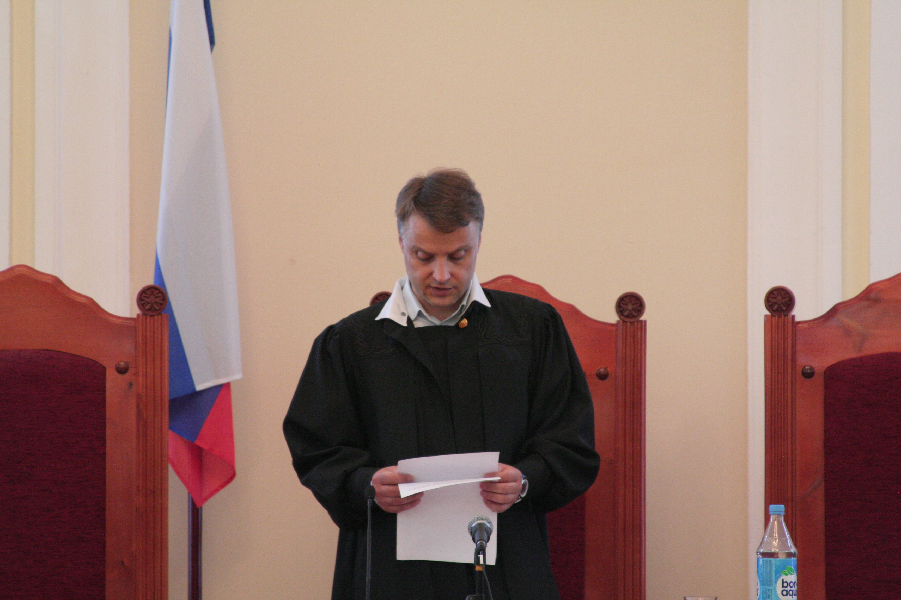 Судья Дмитрий Ходак зачитывает приговор Олегу Белову, 29 июня 2016 года